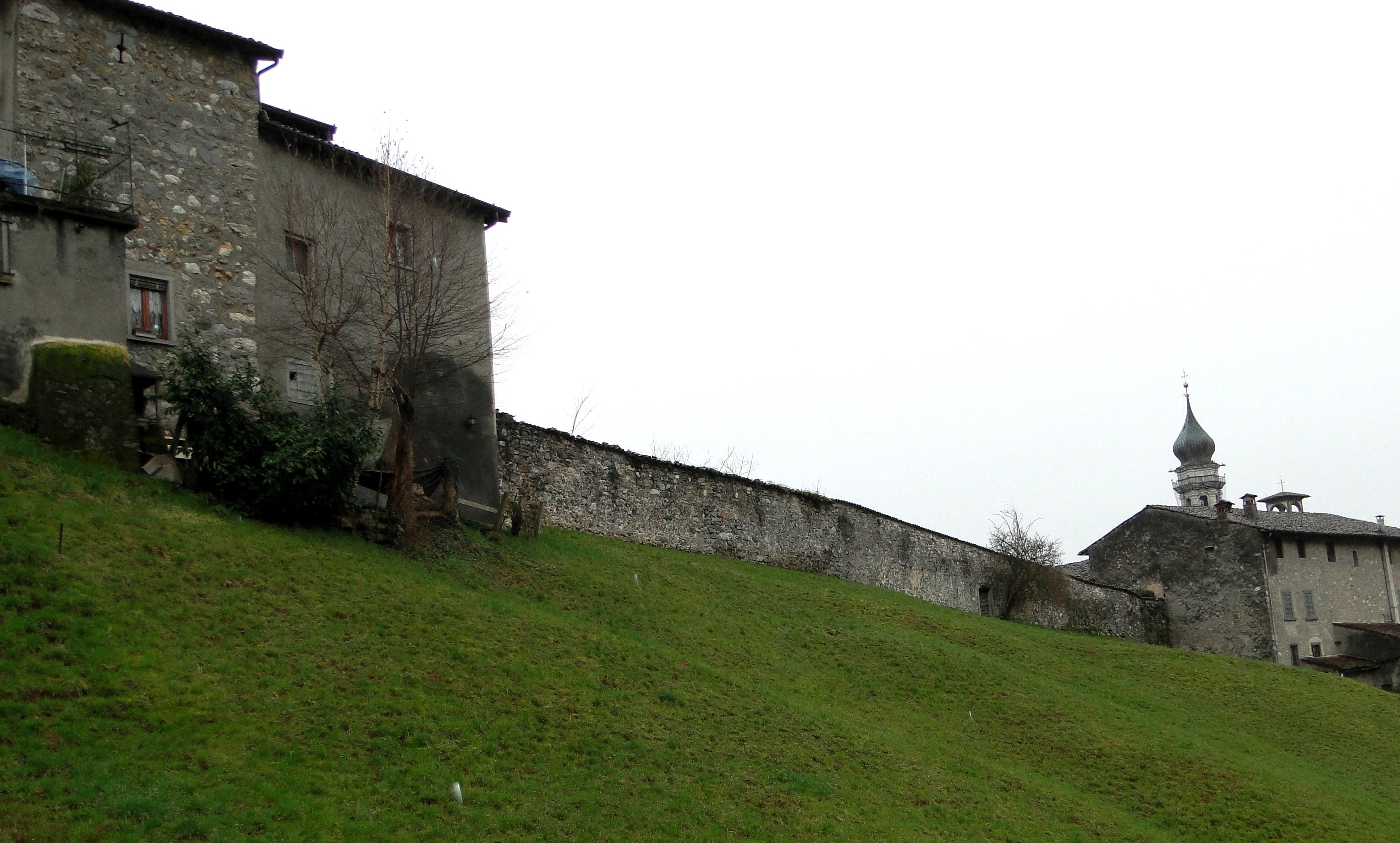 Gandino (BG). Cinta muraria medievale